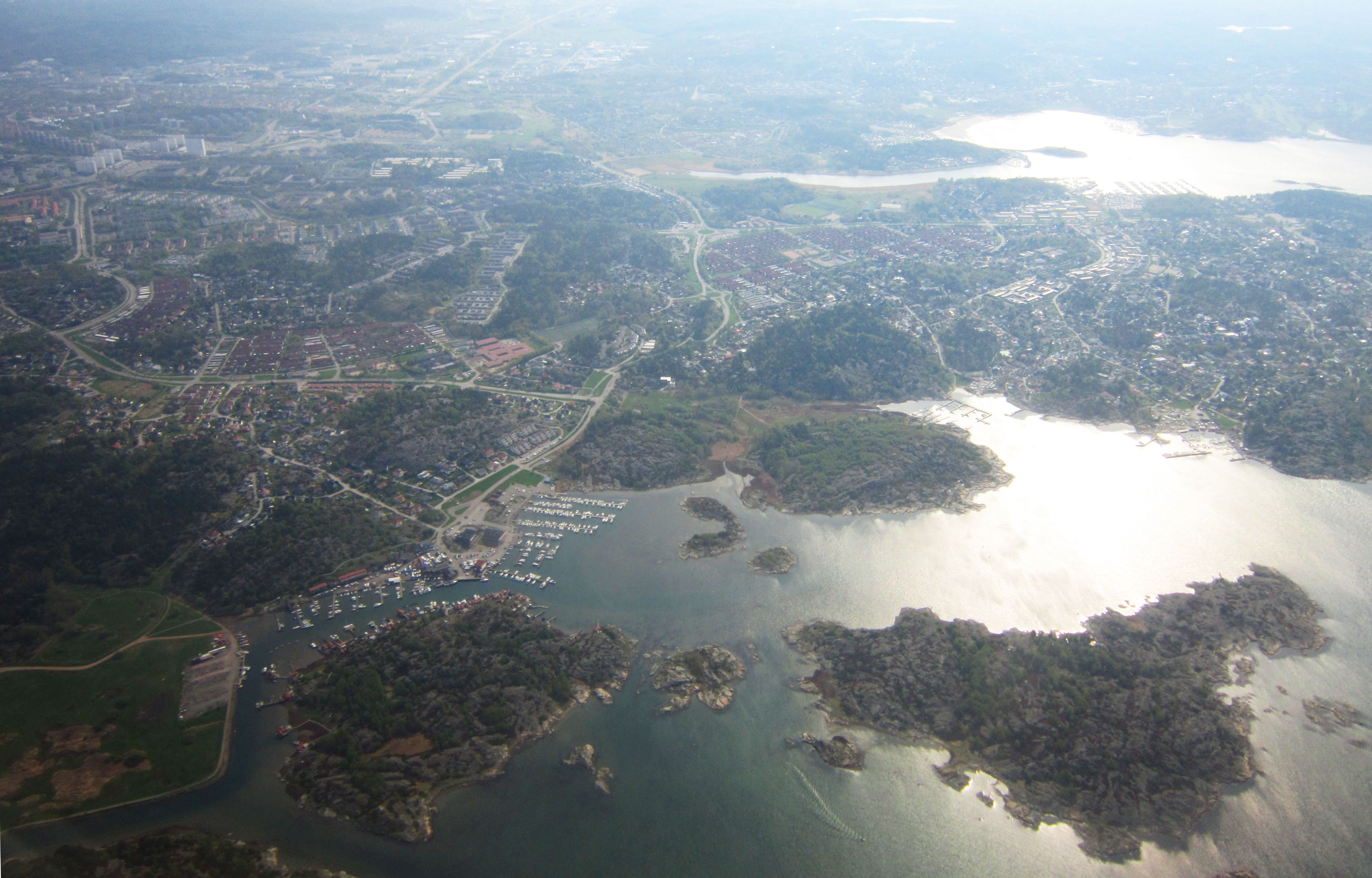 Flygfoto över Tynnered i Västra Göteborg, ön i det nedre högra hörnet är Långholmen